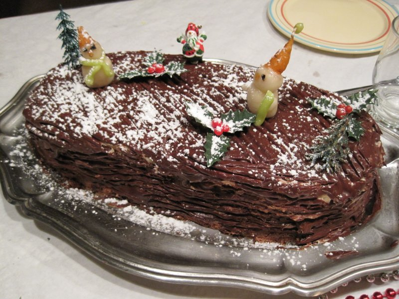 Buche de noel